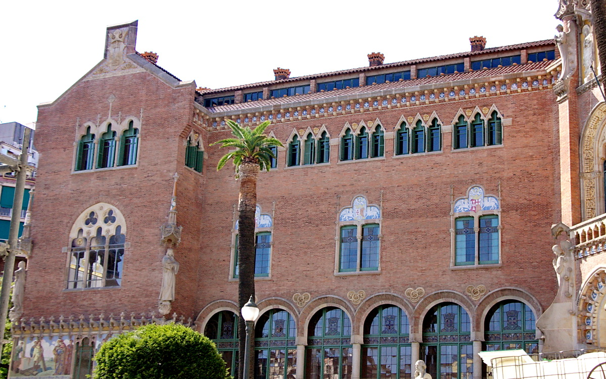 Façana ala de ponent de l'edifici d'administració de l'Hospital de Sant Pau (Barcelona, Catalunya), obra de Lluís Domènech i Montaner (1905)